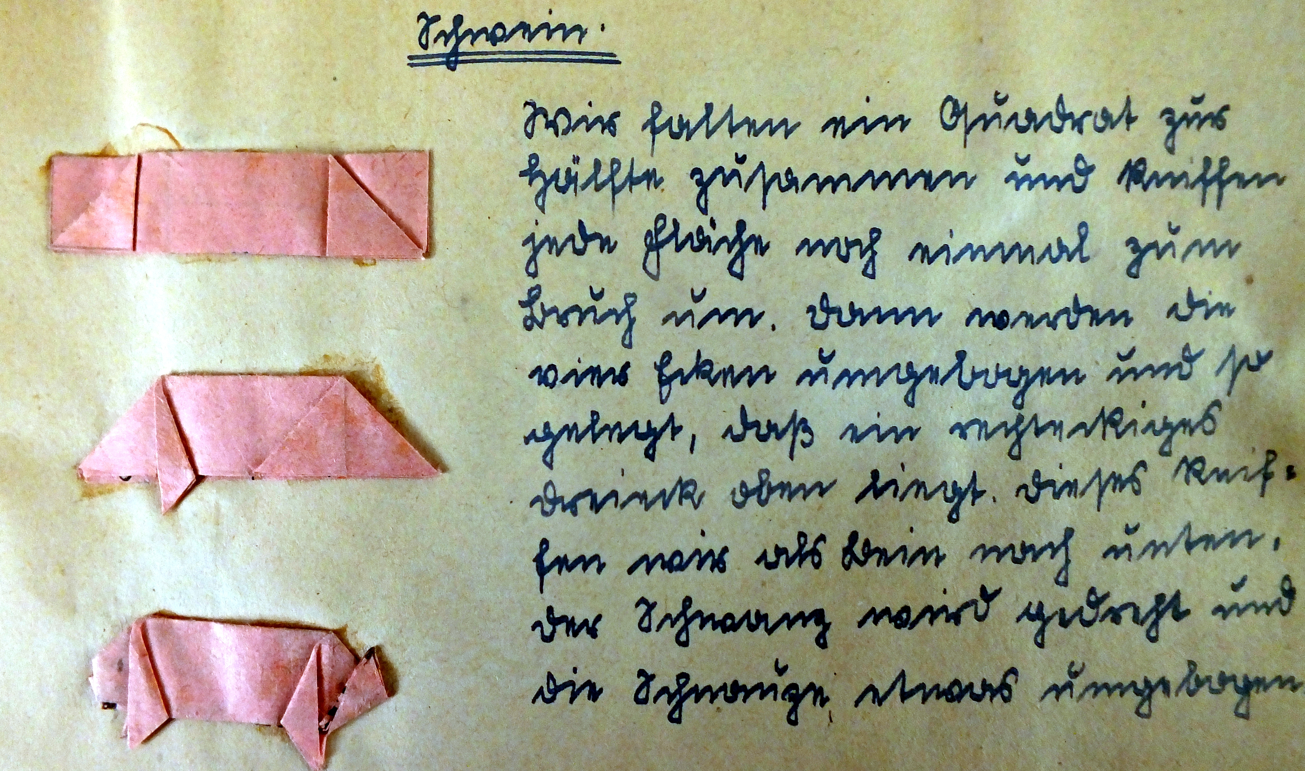 Anschauungsbeispiel eines individuellen Anleitungsbüchleins für den Fröbelschen Schulunterricht; in meinem Privatbesitz